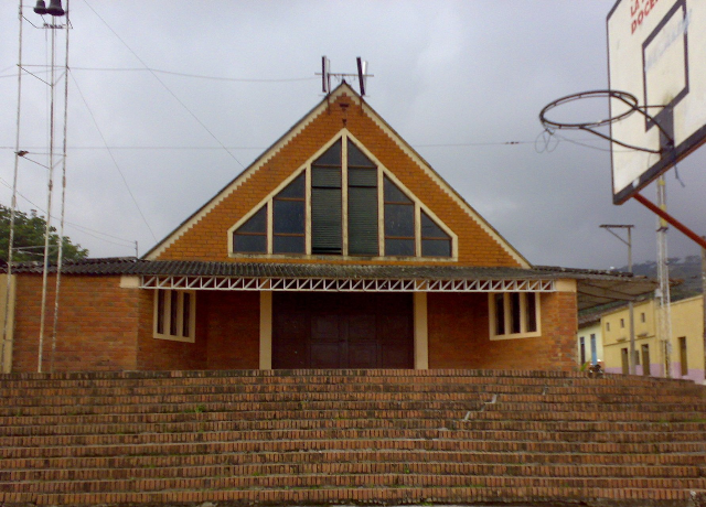 Iglesia